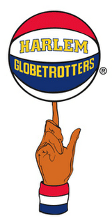 Logo des Globetrotters (Trouvé sur la page anglaise)